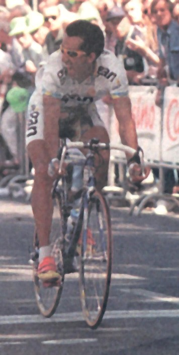 Frédéric Moncassin (Midi Libre [not the Dauphiné] 1997)